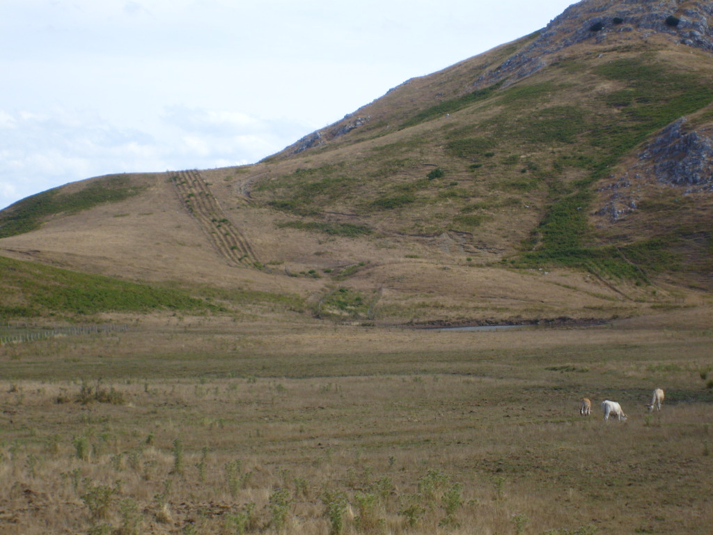 Tipico paesaggio dei Nebrodi